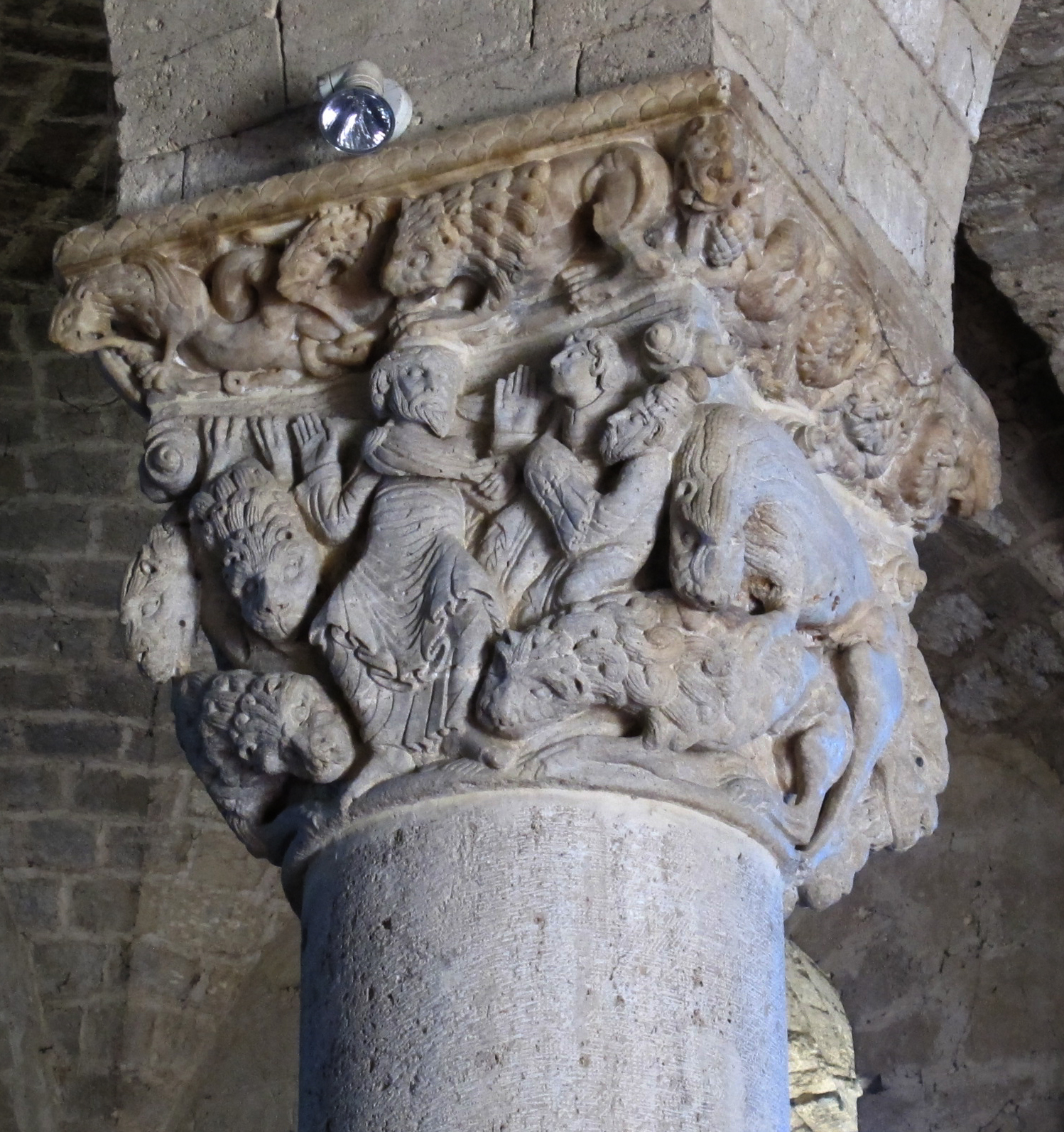 Abbazia di sant'antimo, capitello con daniele nella fossa dei leoni del maestro di cabestany